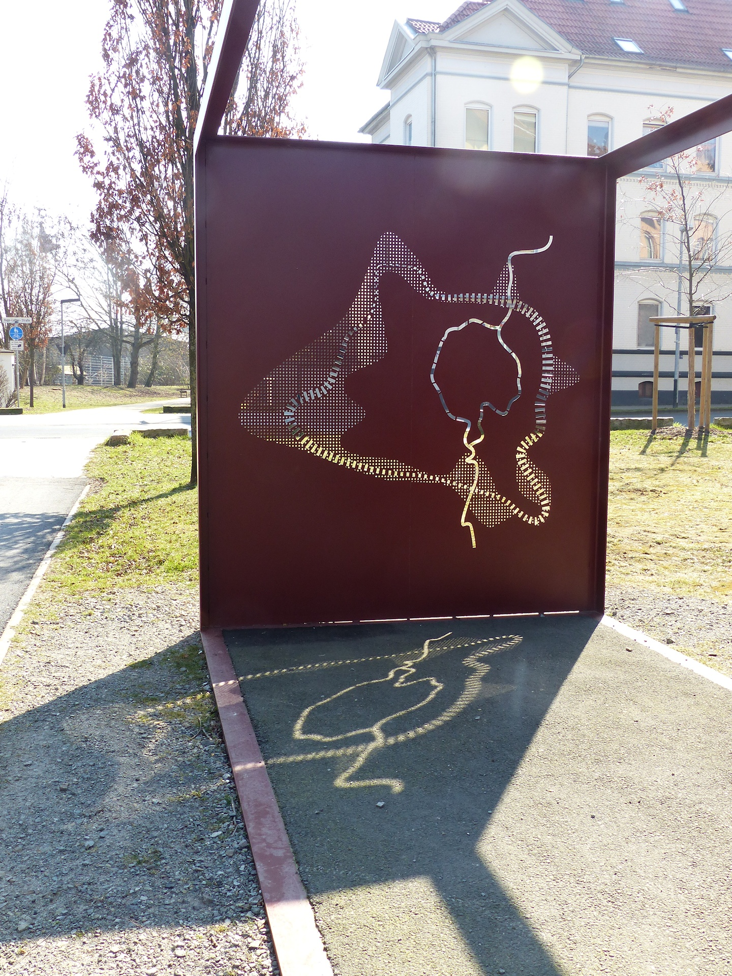 Ringgleis in der geplanten Ausdehnung, hier am Container "Westbahnhof", März 2016